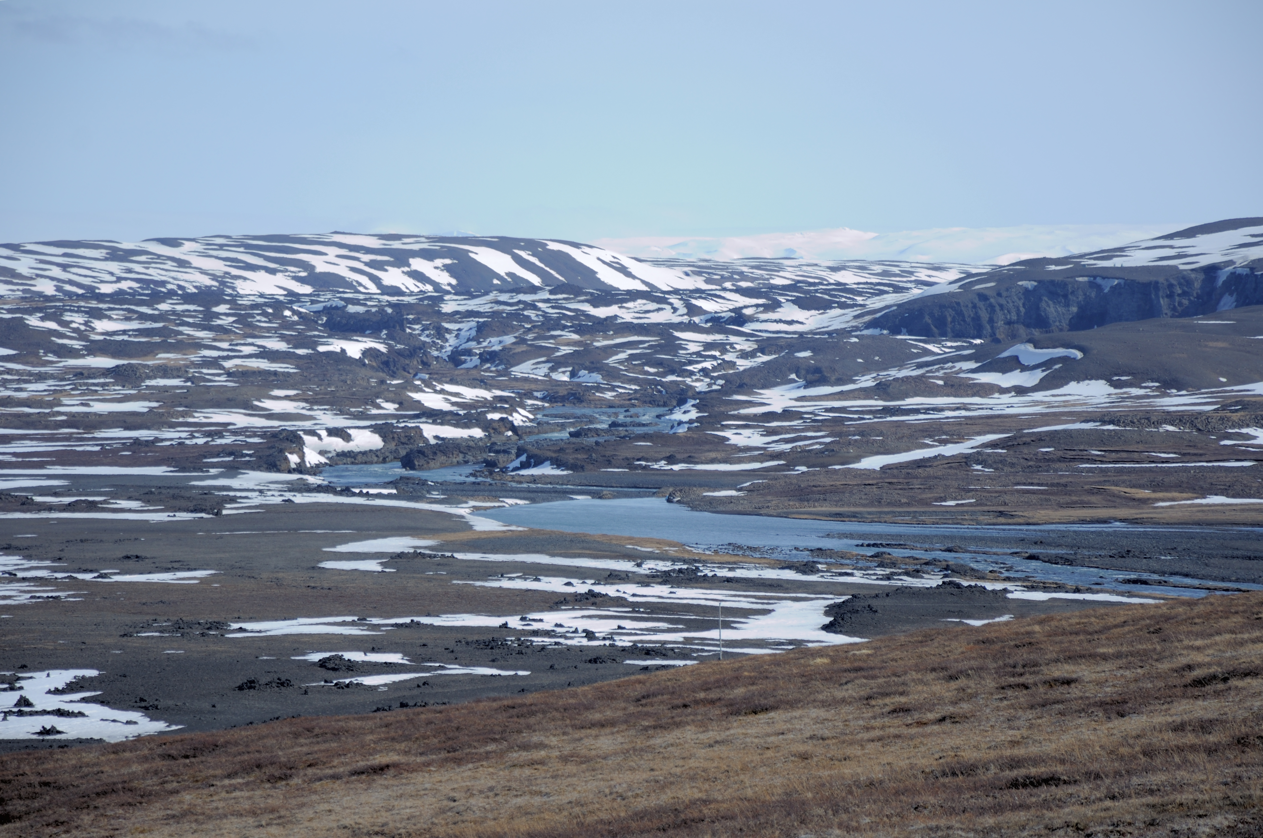 Iceland, Bárðardalur